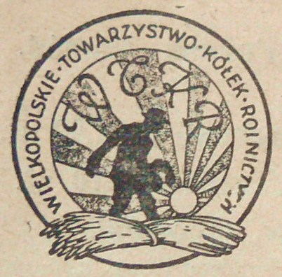 Wielkopolskie Towarzystwo Kolek Rolniczych - symbol (1929r.).